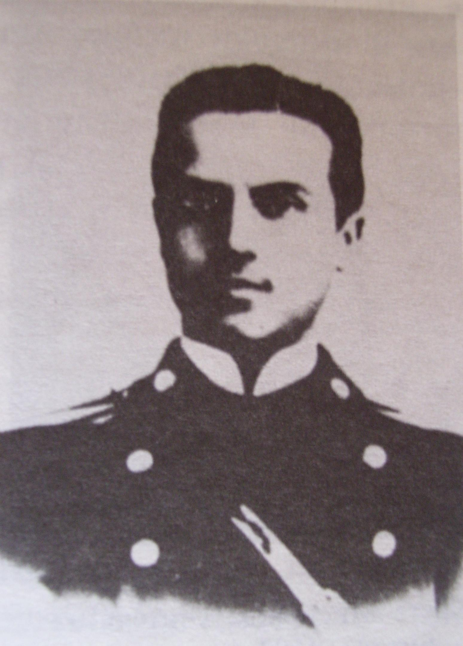 Милан Стоилов